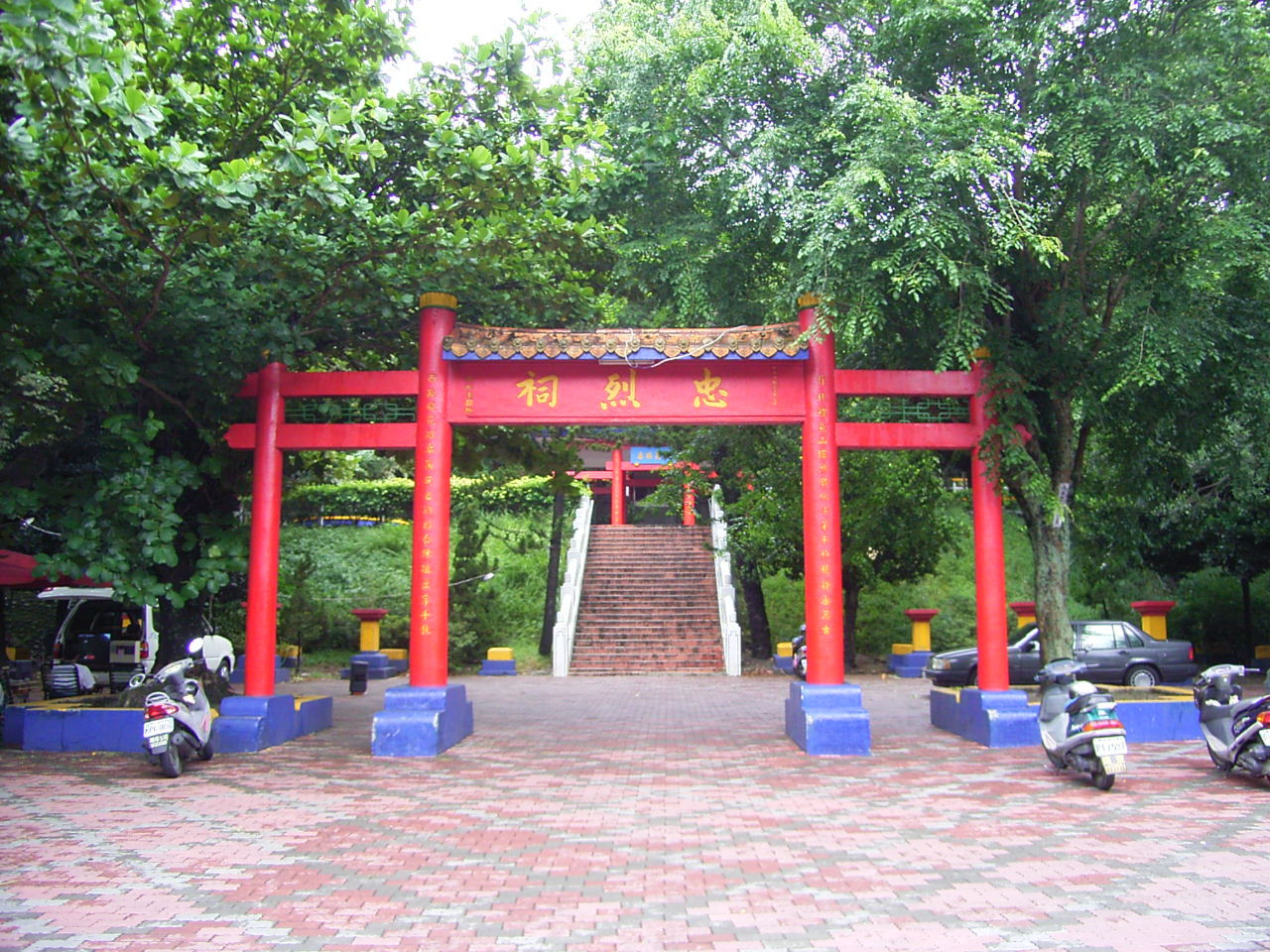 台湾台東市の台東神社の跡は中華民国の兵士を祀る「忠烈祠」になっている。